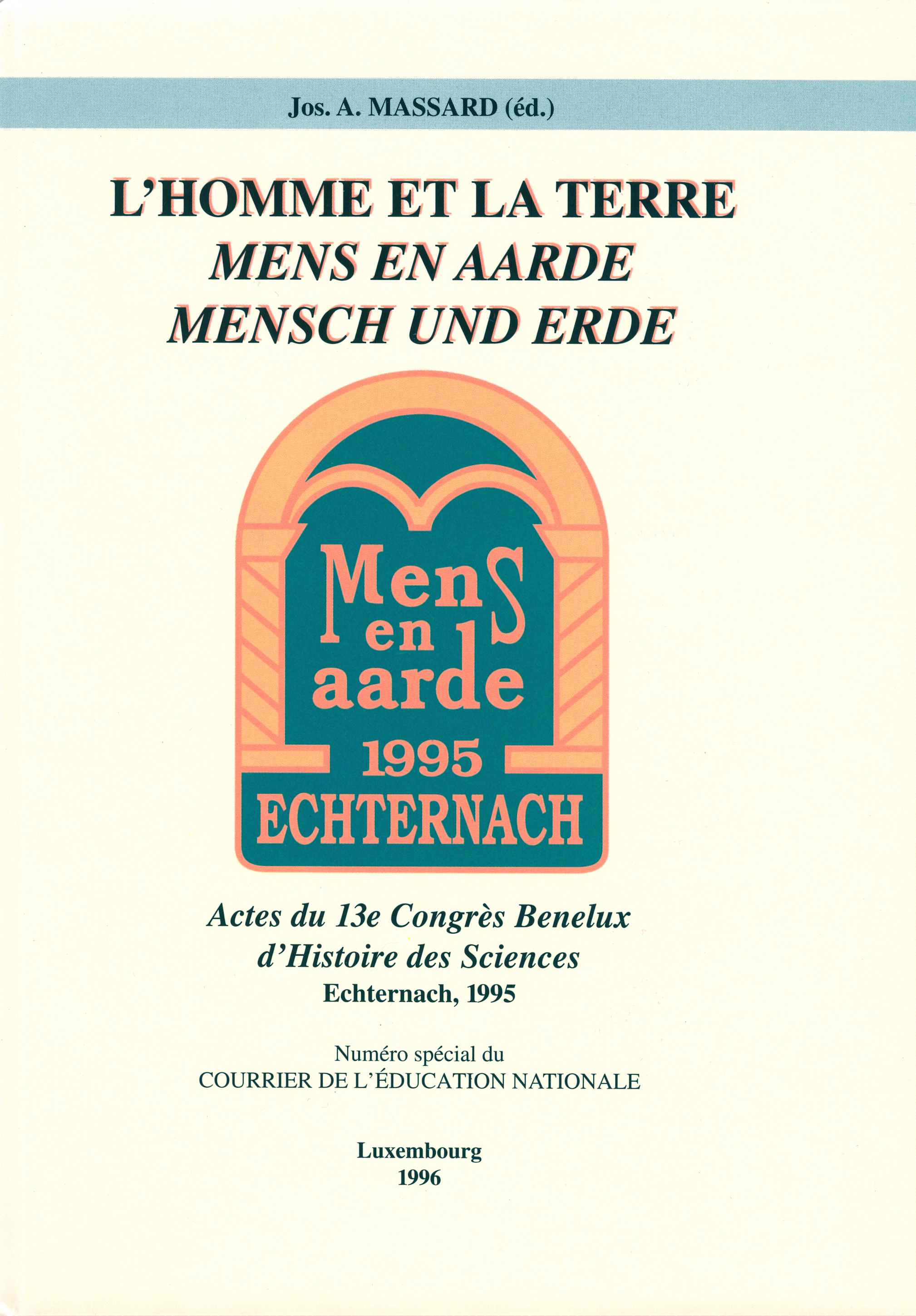 Eng Publikatioun vum Séminaire d'histoire des sciences et de la médecine: Deckel vum Buch: Massard, J.A. (éd.), B. Gales, G. Geimer, E. Homburg, A. Labisch, G. Vanpaemel (collab.), 1996. L’Homme et la Terre. Mens en Aarde. Mensch und Erde. Actes du 13e Congrès Benelux d’Histoire des Sciences, Echternach (Luxembourg), 1995. Luxembourg, Séminaire d’Histoire des Sciences et de la Médecine du Centre Universitaire de Luxembourg, 280 p. (Numéro spécial du Courrier de l’Education Nationale).